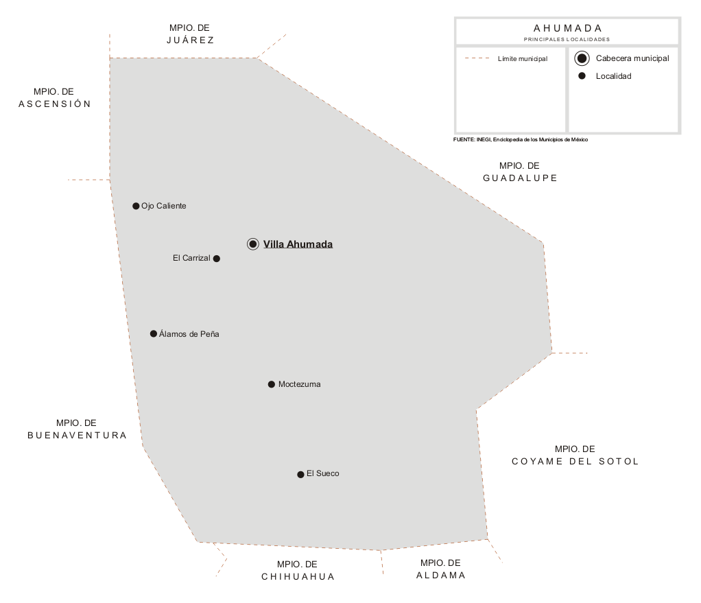 Mapa de las principales localidades del Municipio de Ahumada en el estado de Chihuahua, México.